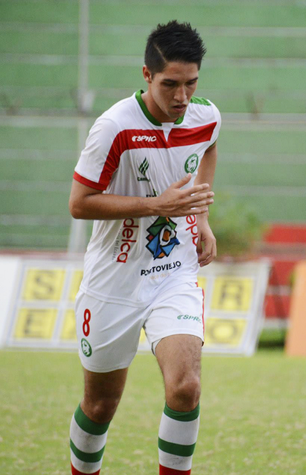 Tito Mendoza jugando para 5 de Julio en el 2015